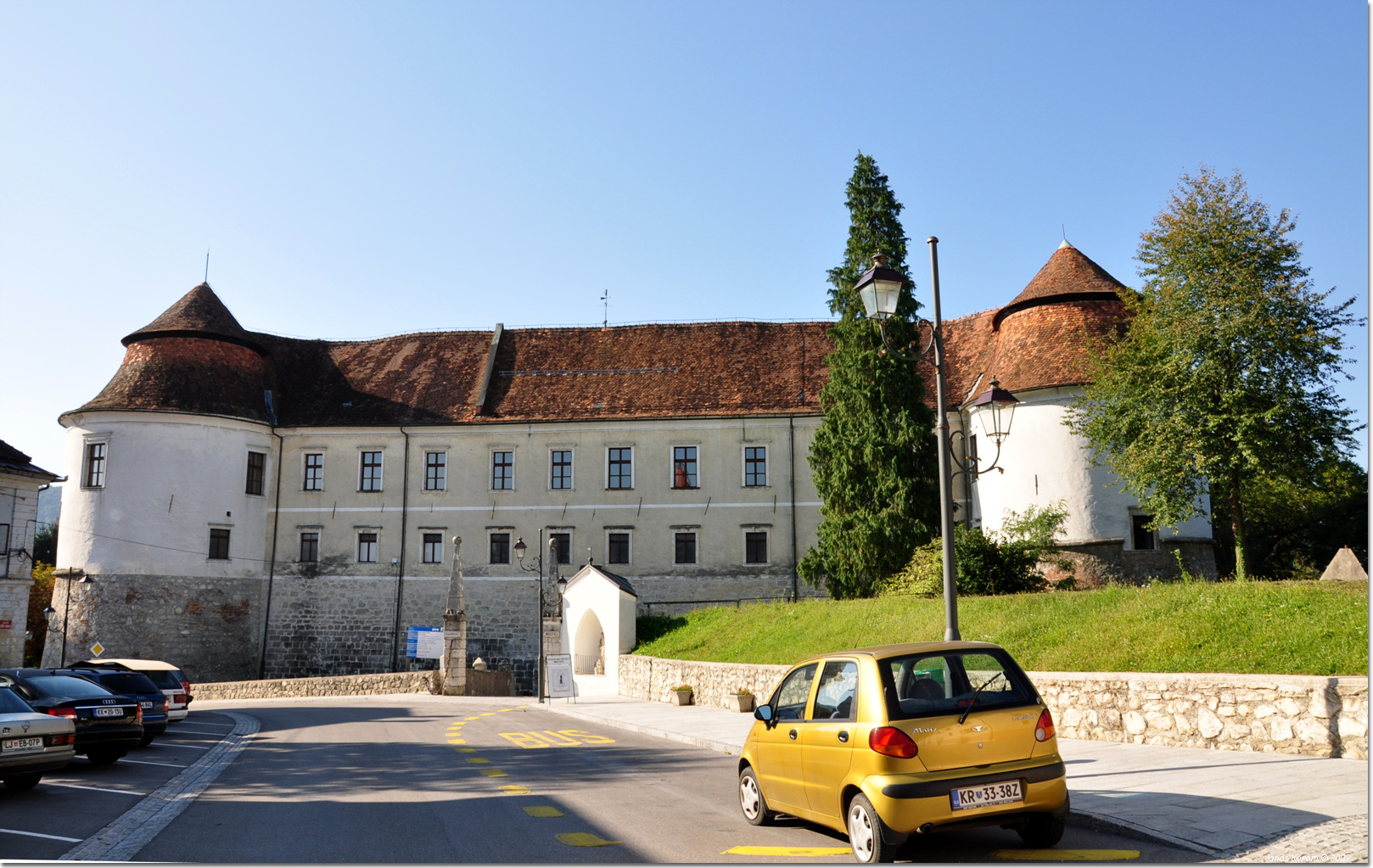 Brezice (12)